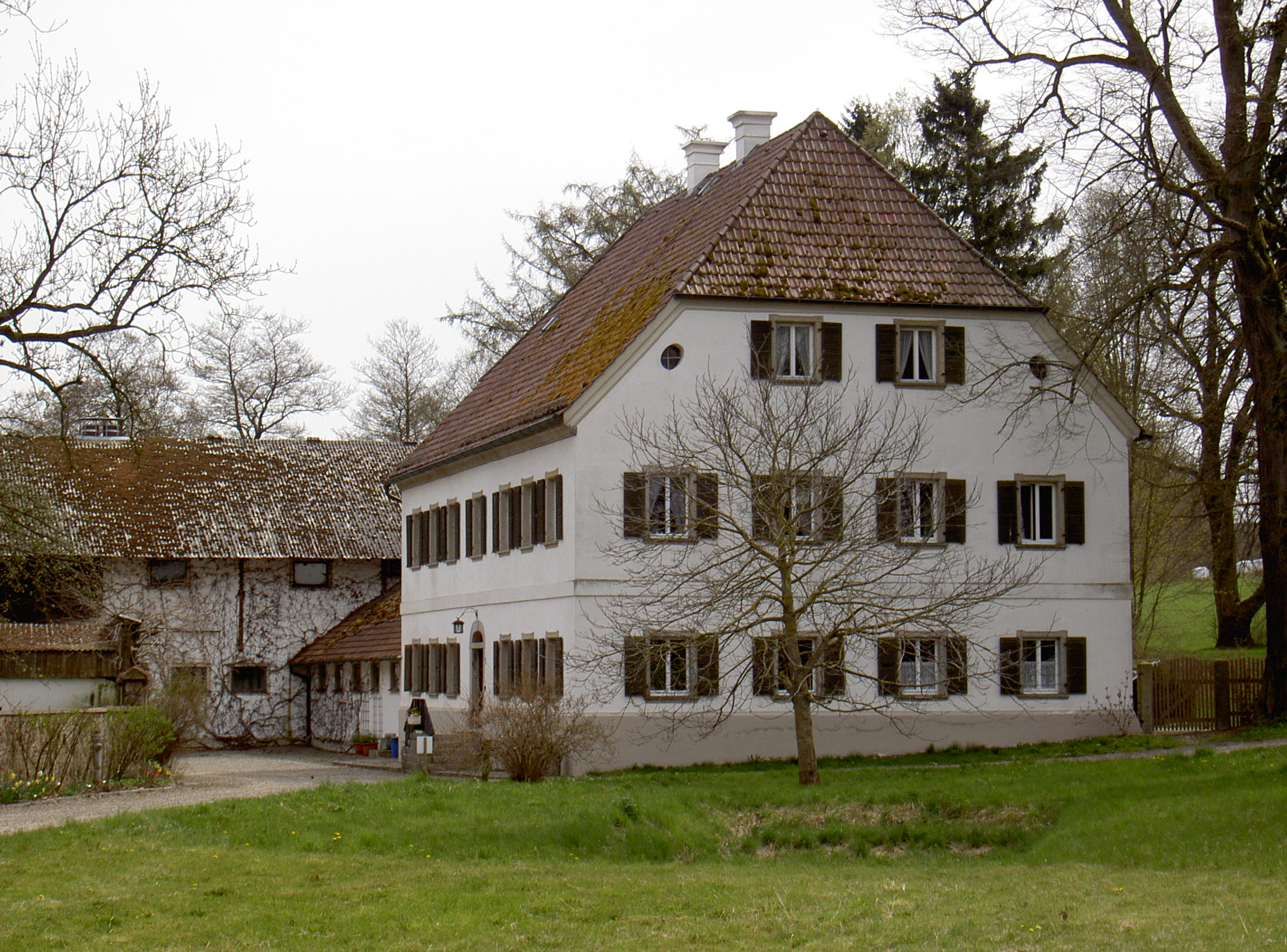 Hammerhaus in Gröbenstädt